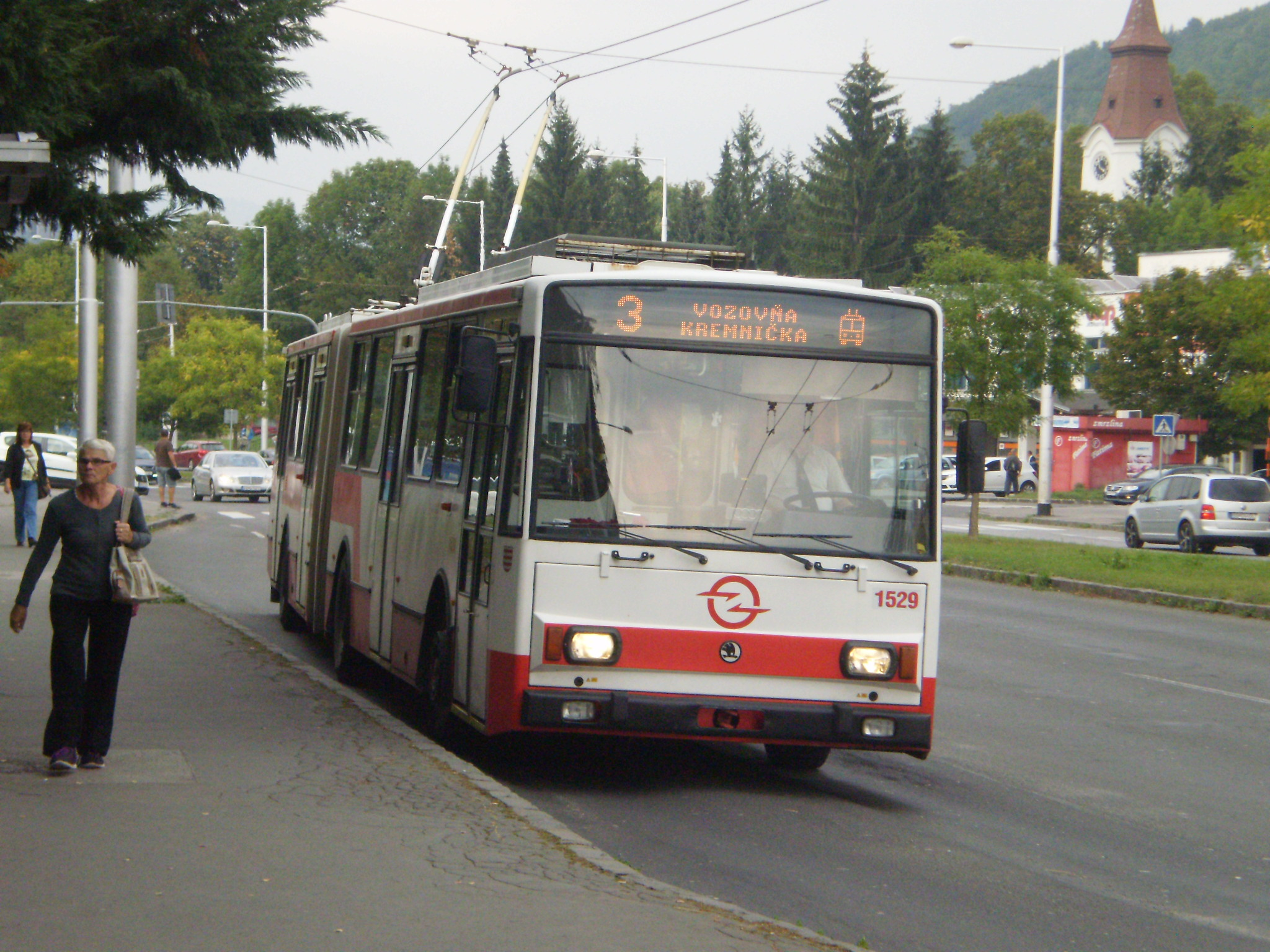 škoda 15 Trm